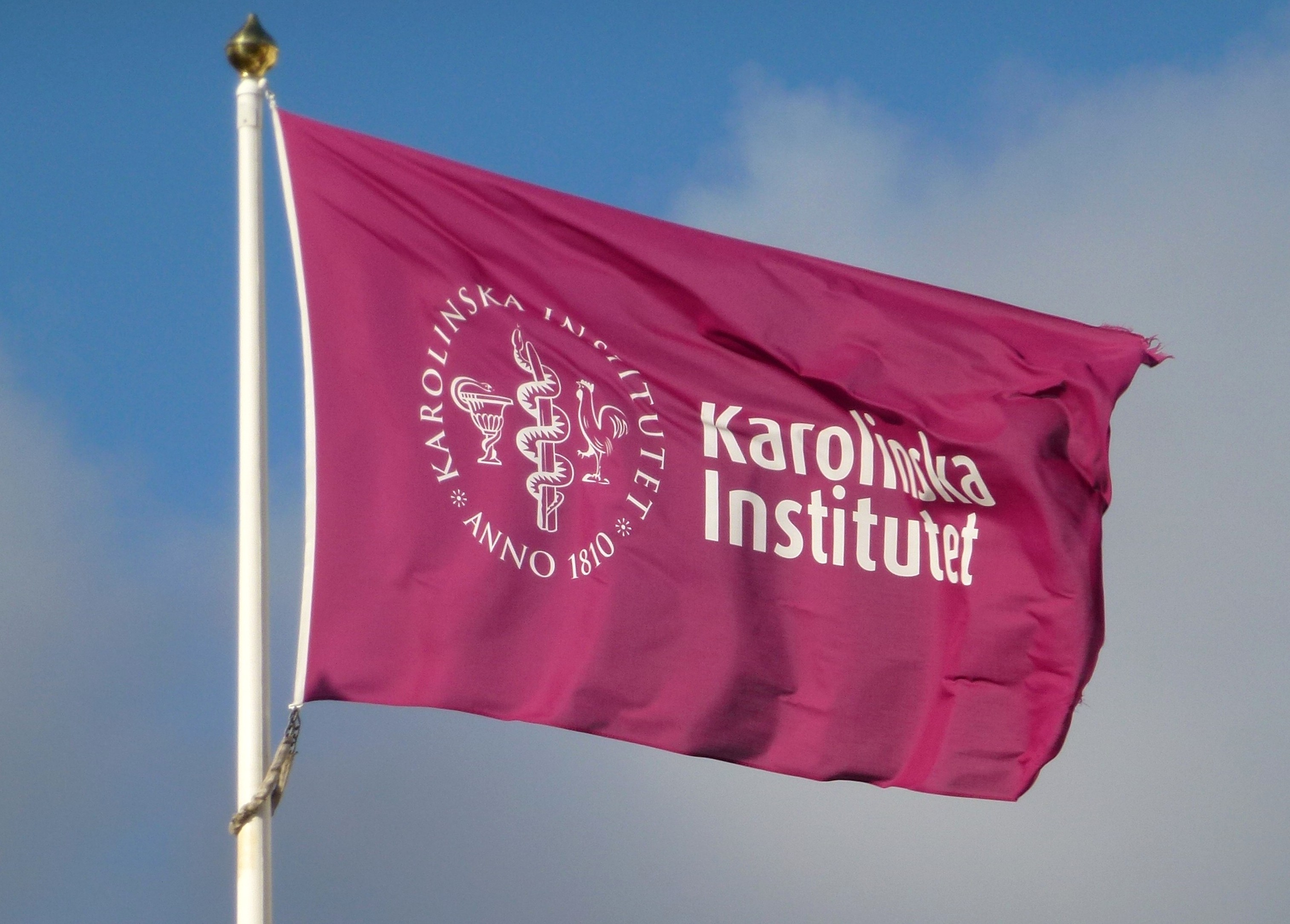 Karolinska institutes flagga 2012